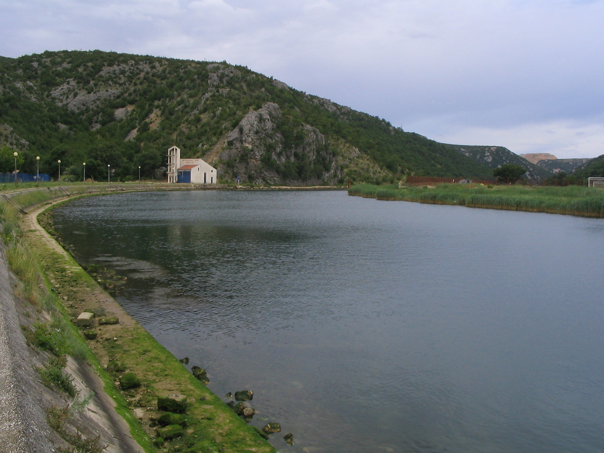 Zrmanja in Obrovac, Croatia